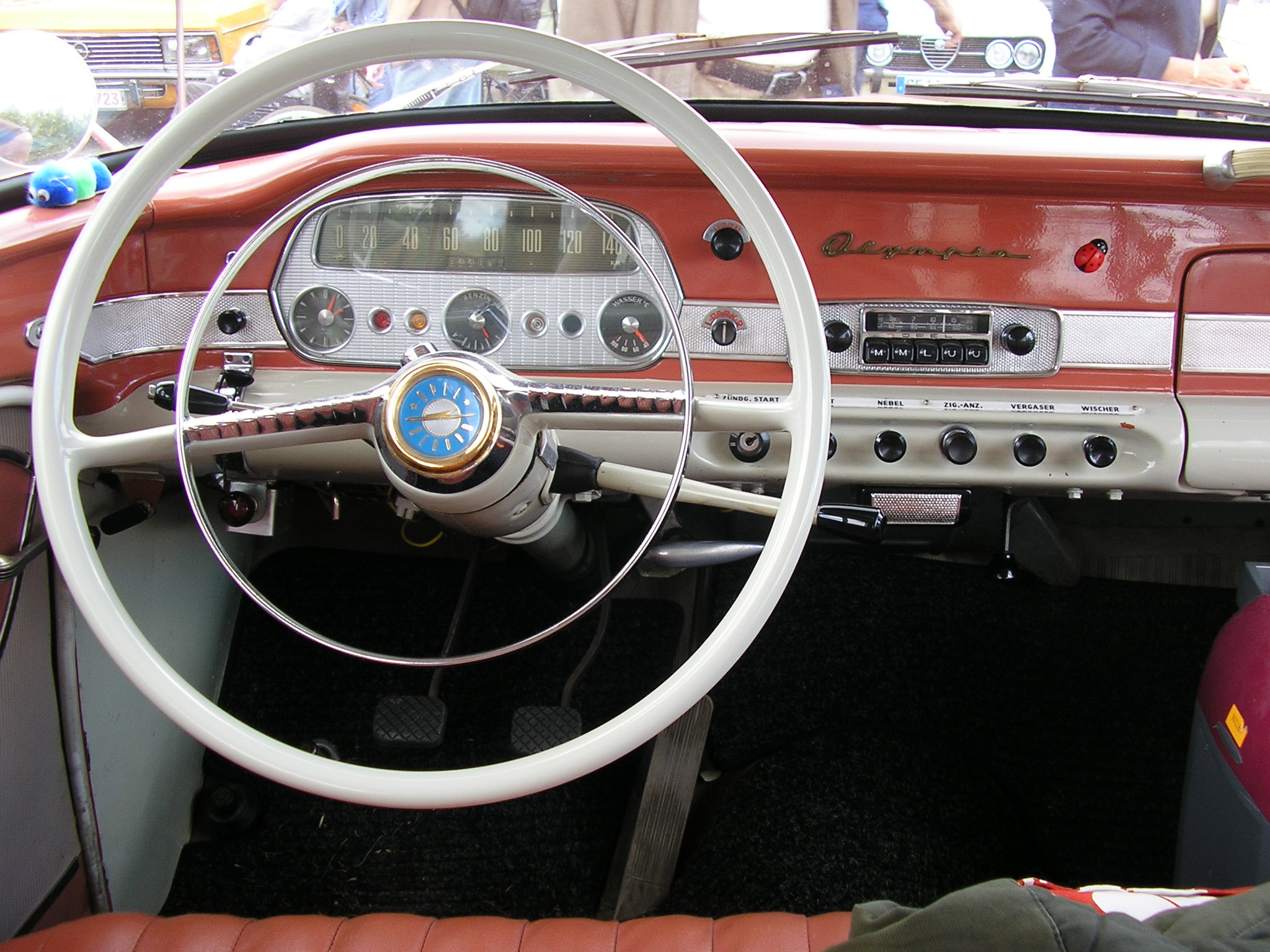 Armaturen Opel Olympia (1959)